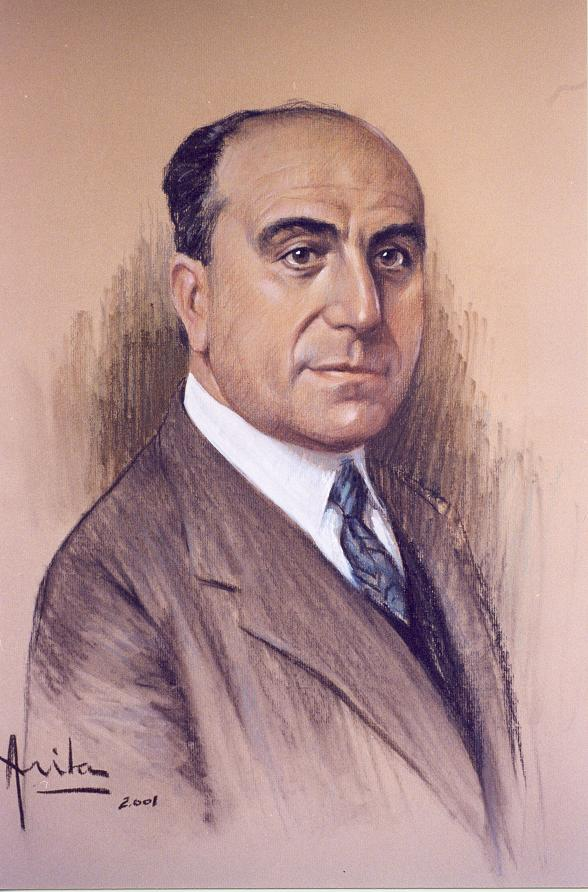 Enrique Suñer Ordóñez (Poza de la Sal, Burgos 26/09/1878 - Madrid 26/05/1941) médico pediatra, escritor y político español. Presidente de la Organización Médica Colegial de España (1937-1941). Vicepresidente de la Comisión de Cultura y Enseñanza de la Junta Técnica del Estado (1936-1938)